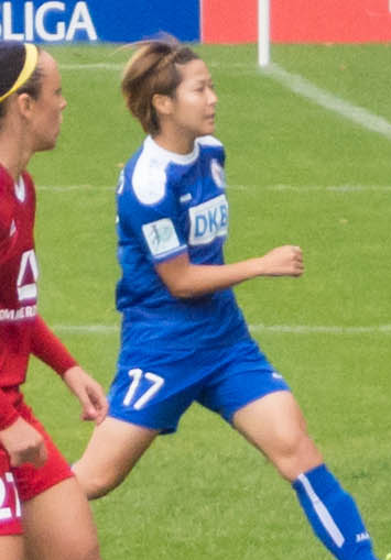 am 21.9.2014 in Babelsberg/Potsdam Endstand 2:1